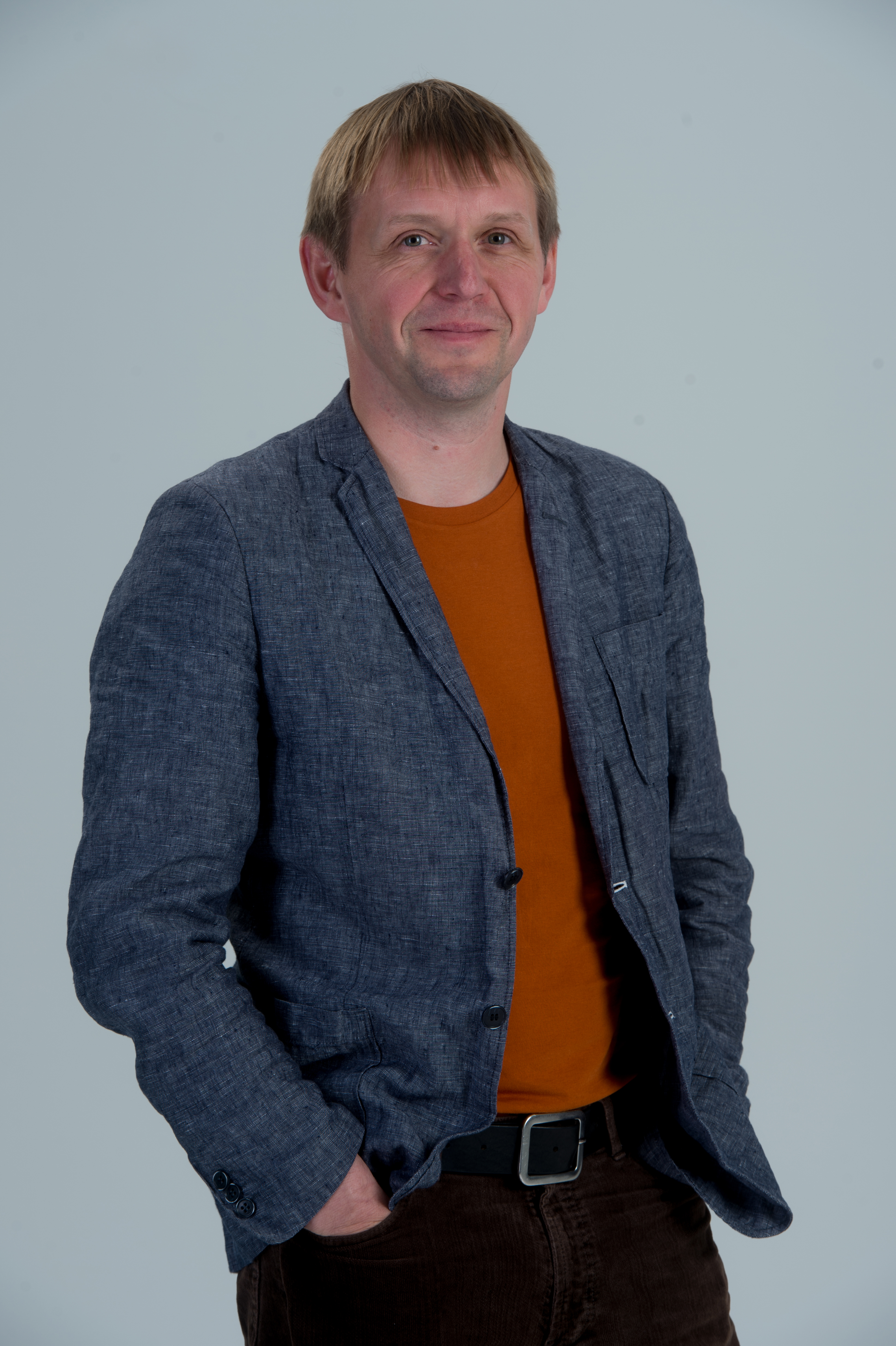 Villu Päärt